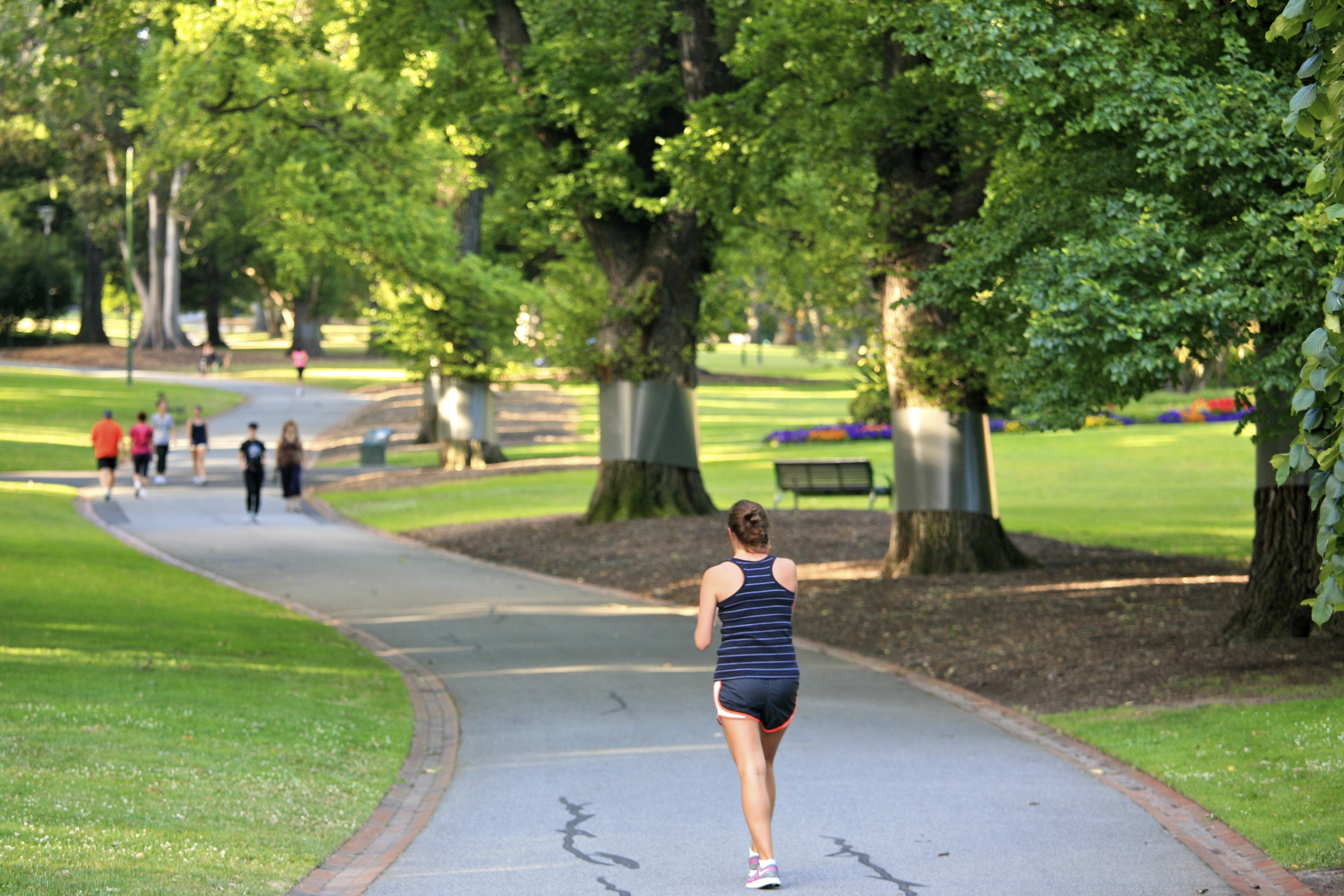 Lunchtime Walk